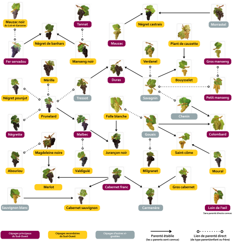 Liens de parenté entre cépages